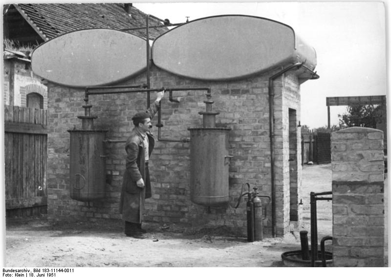 Trebus, Filteranlage für Diesel Illus Klein 18.6.51 Erntevorbereitungen auf der MAS Trebus Krs. Seelow. Um eine Steigerung der Produktion in der Landwirtschaft zu erreichen und die Lebenslage der Werktätigen noch weiter zu verbessern, muss die Ernte ohne Verlust eingebracht werden. Dies ist nur möglich, wenn die landwirtschaftlichen Maschinen in Ordnung sind. Daher werden auf allen MAS umfangreiche Erntevorbereitungen getroffen. Unsere Fotos zeigen die Vorbereitungen auf MAS Trebus. UBz: Der Werkstattleiter der MAS Trebus, Krüger, hat eine neue Filteranlage für Diesel-Kraftstoff konstruiert. Durch diese Filteranalage wird der Kraftstoff, bevor er dem Traktor zugeführt wird, gründlich gereinigt. Dadurch werden Ausfälle von Pumpen und Düsen an den Traktoren vermieden. Kollege Krüger mit der neukonstruierten Anlage.